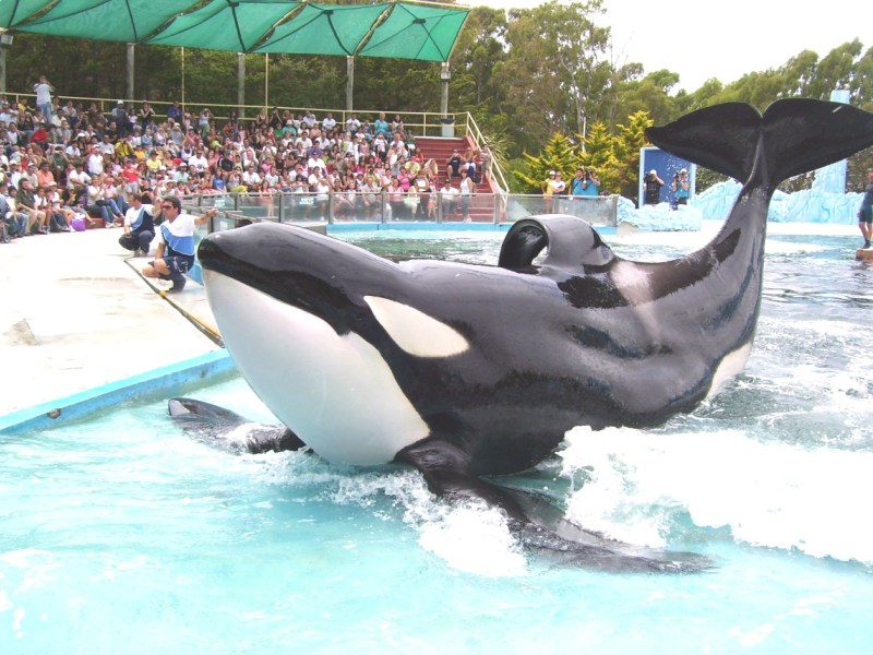 Orca en un oceanario argentino.